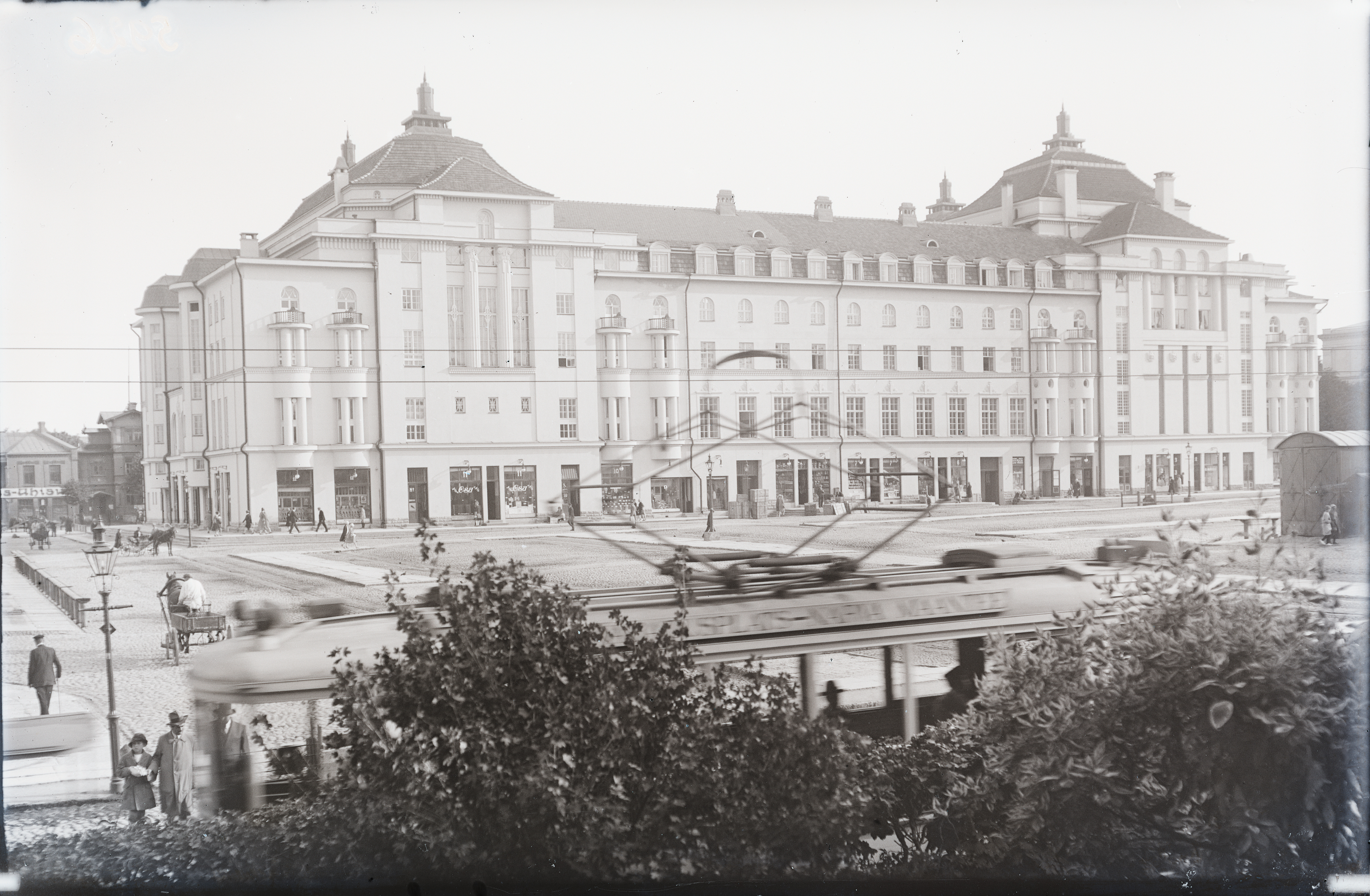 Tallinn, teater Estonia - vaade turuplatsile